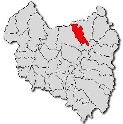 Categorie:Hărţi ale judeţului Covasna